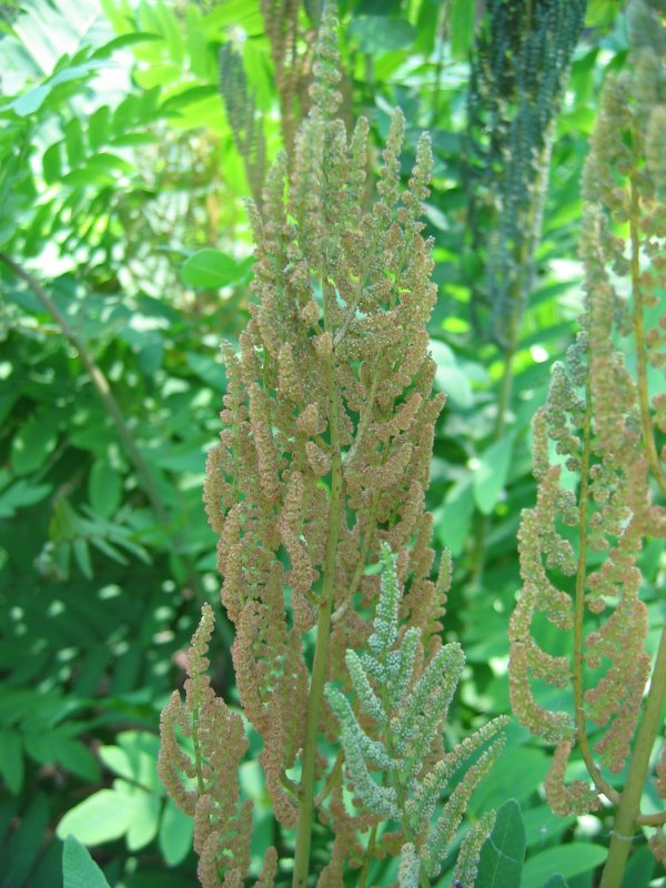 Königsfarn Osmunda regalis, Sporophyllstand, Zingst